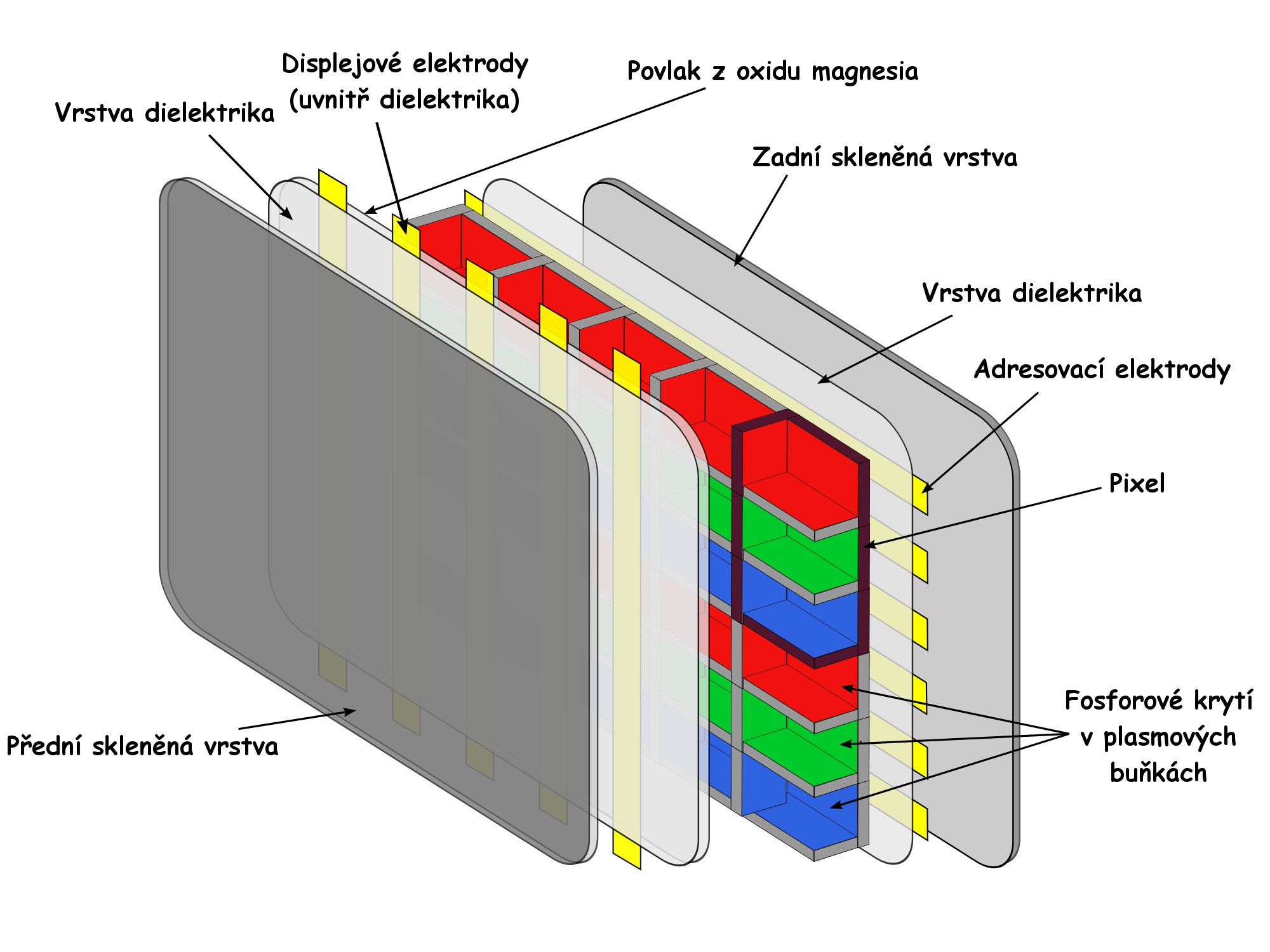 Schéma funkce plasmové obrazovky